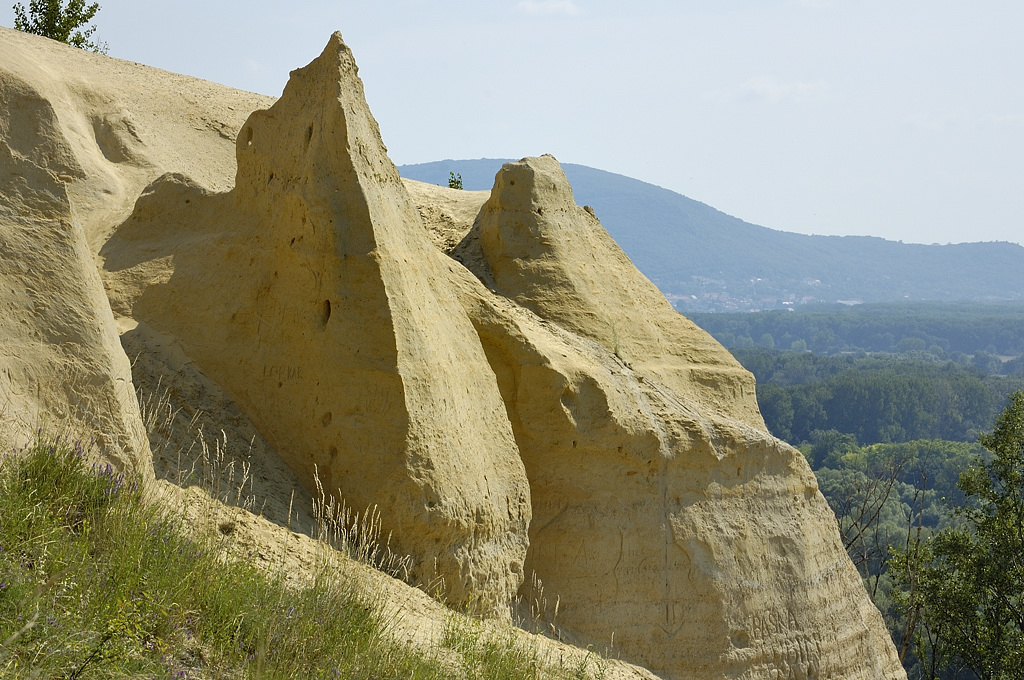 Sandberg